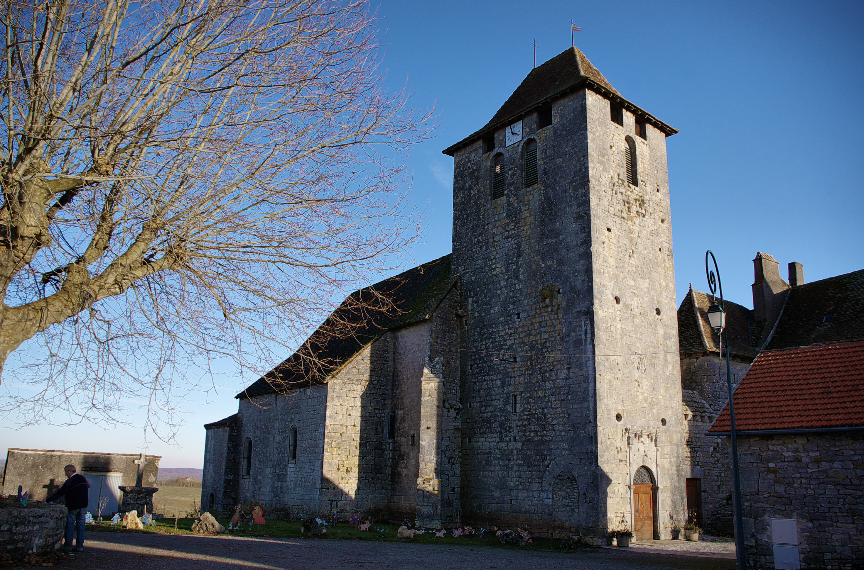 Église Sainte-Marie-Madeleine de Soulomès